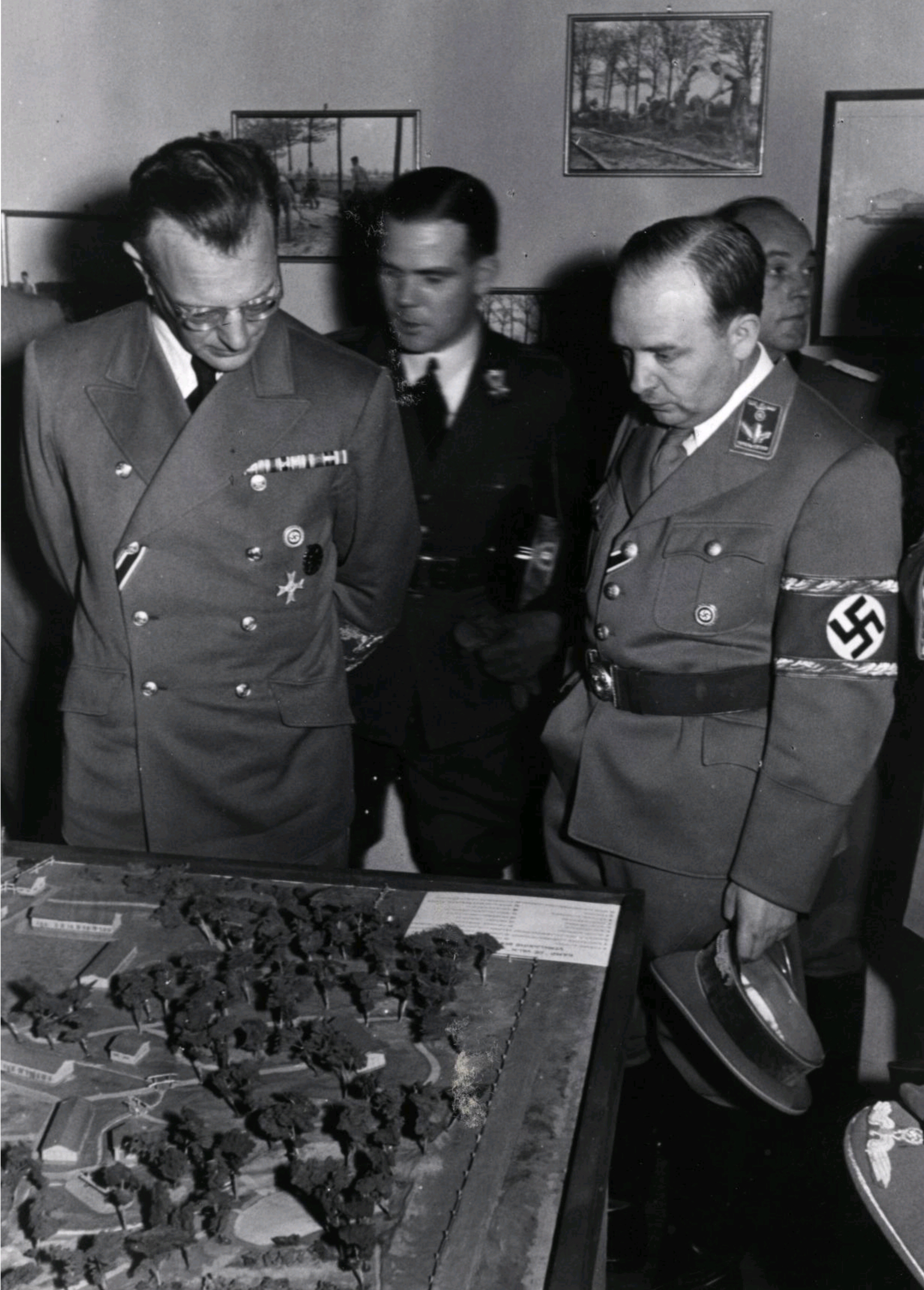 Op 11 oktober 1941 wordt in Rotterdam een grote RAD (Reichs Arbeit Dienst)-tentoonstelling geopend in aanwezigheid van Rijkscommissaris Dr. A. Seyss-Inquart (links) en Generaalcommissaris Schmidt.